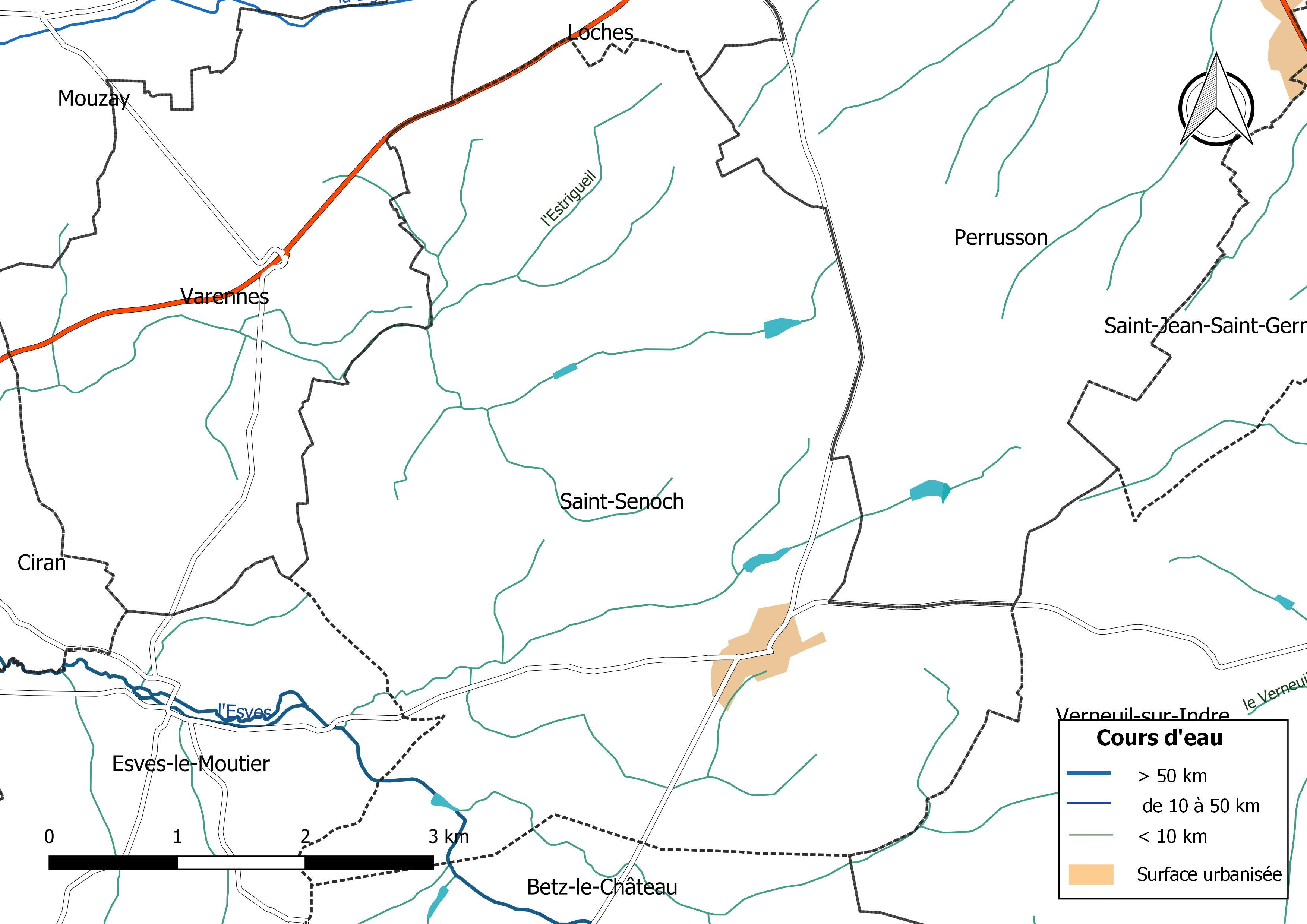 Carte du réseau hydrographique de la commune de Saint-Senoch (France).